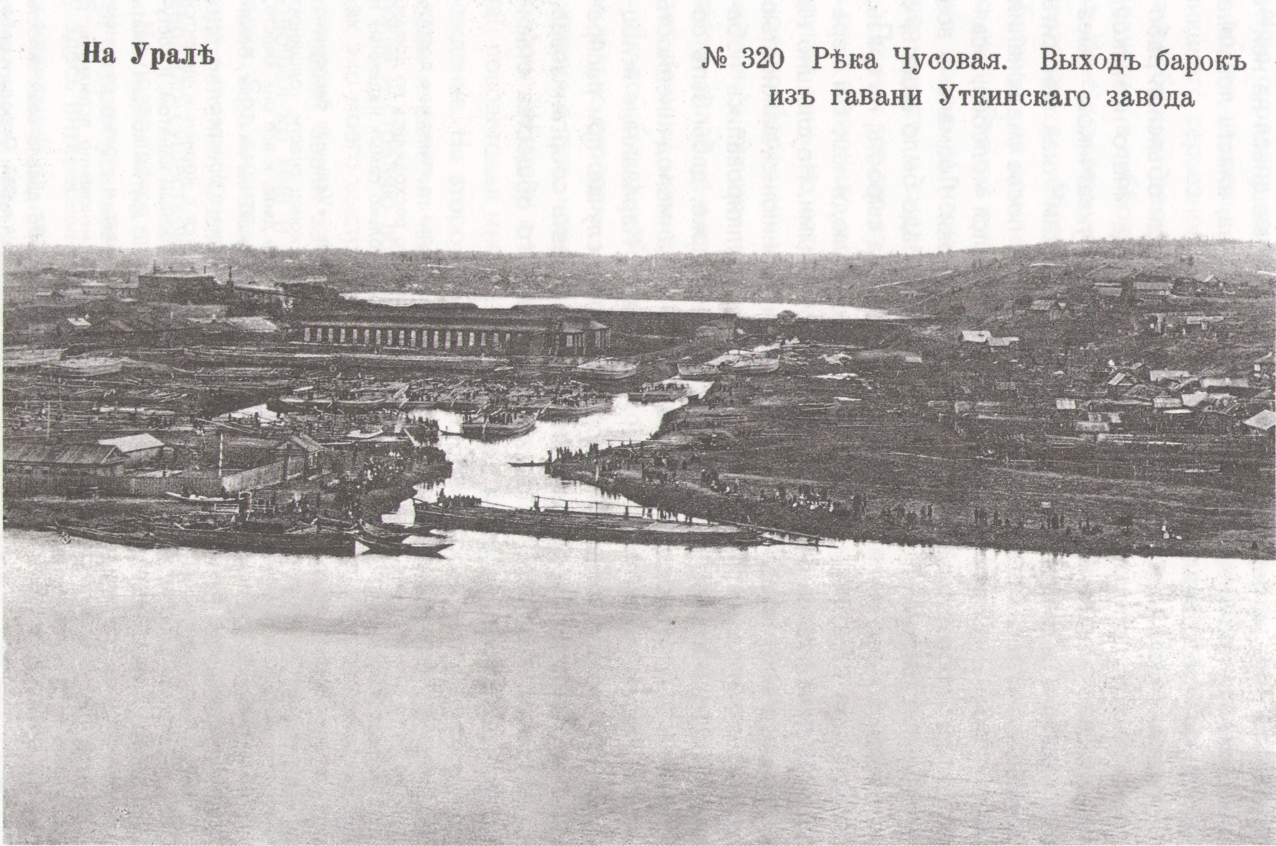 Метенков В.Л. Выход барок со Староуткинской пристани, 1893